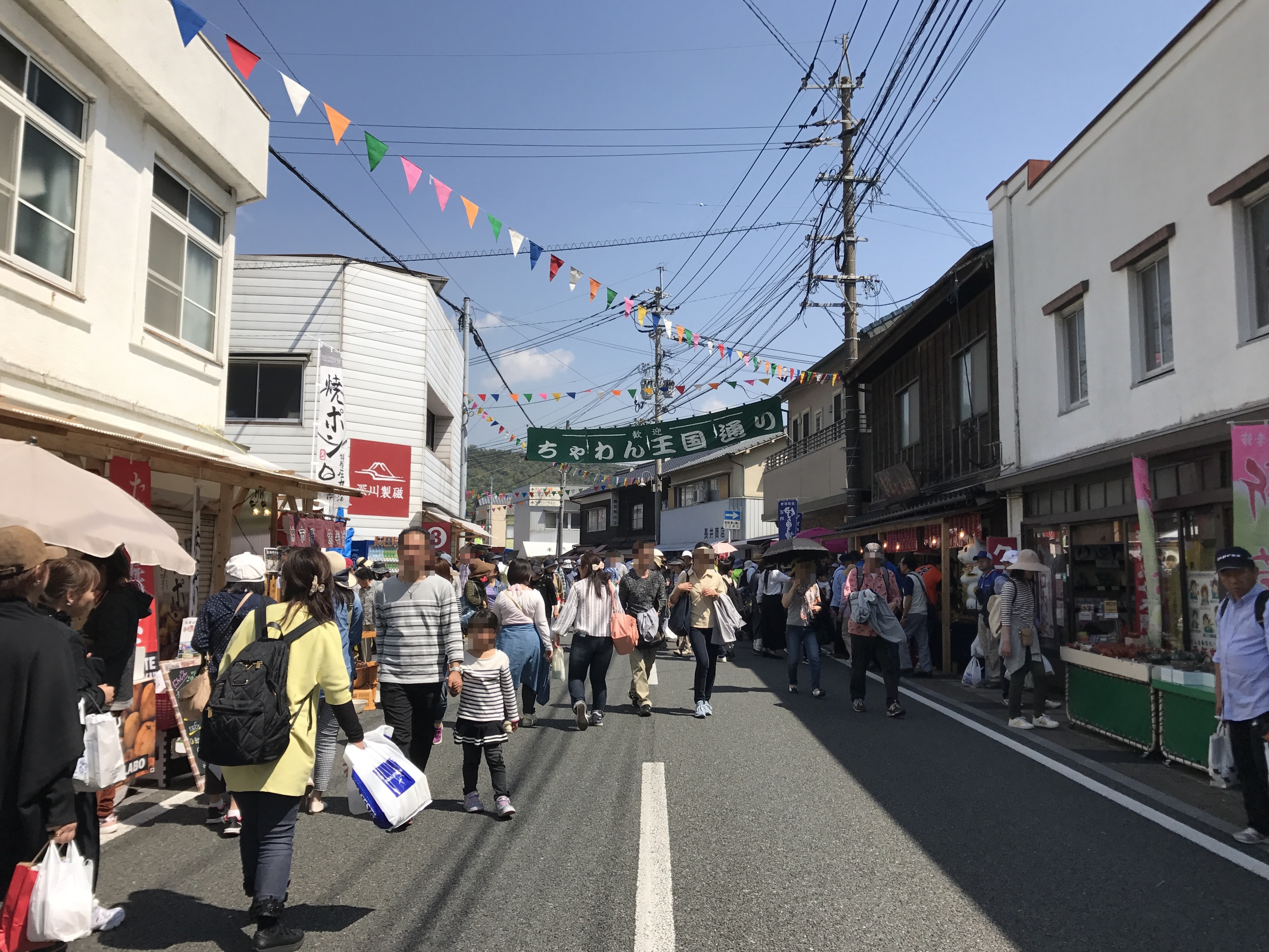 有田陶器市